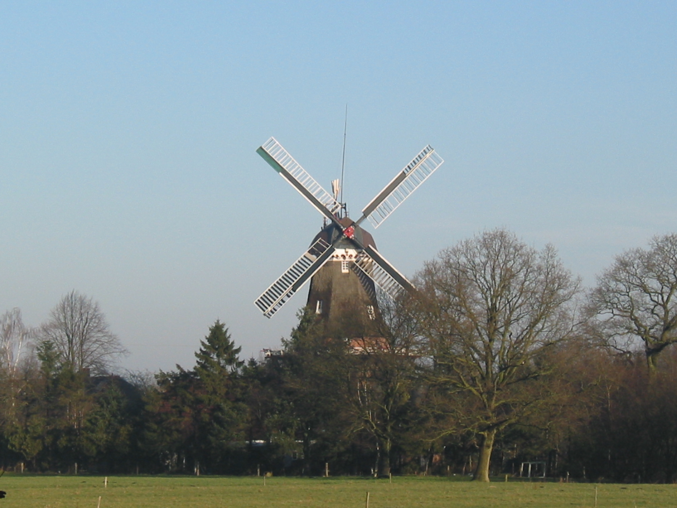 Gallerie-Holländer-Windmühle Spetzerfehn